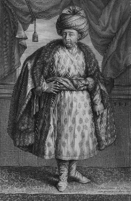 Jean-Baptiste Tavernier en costume oriental.